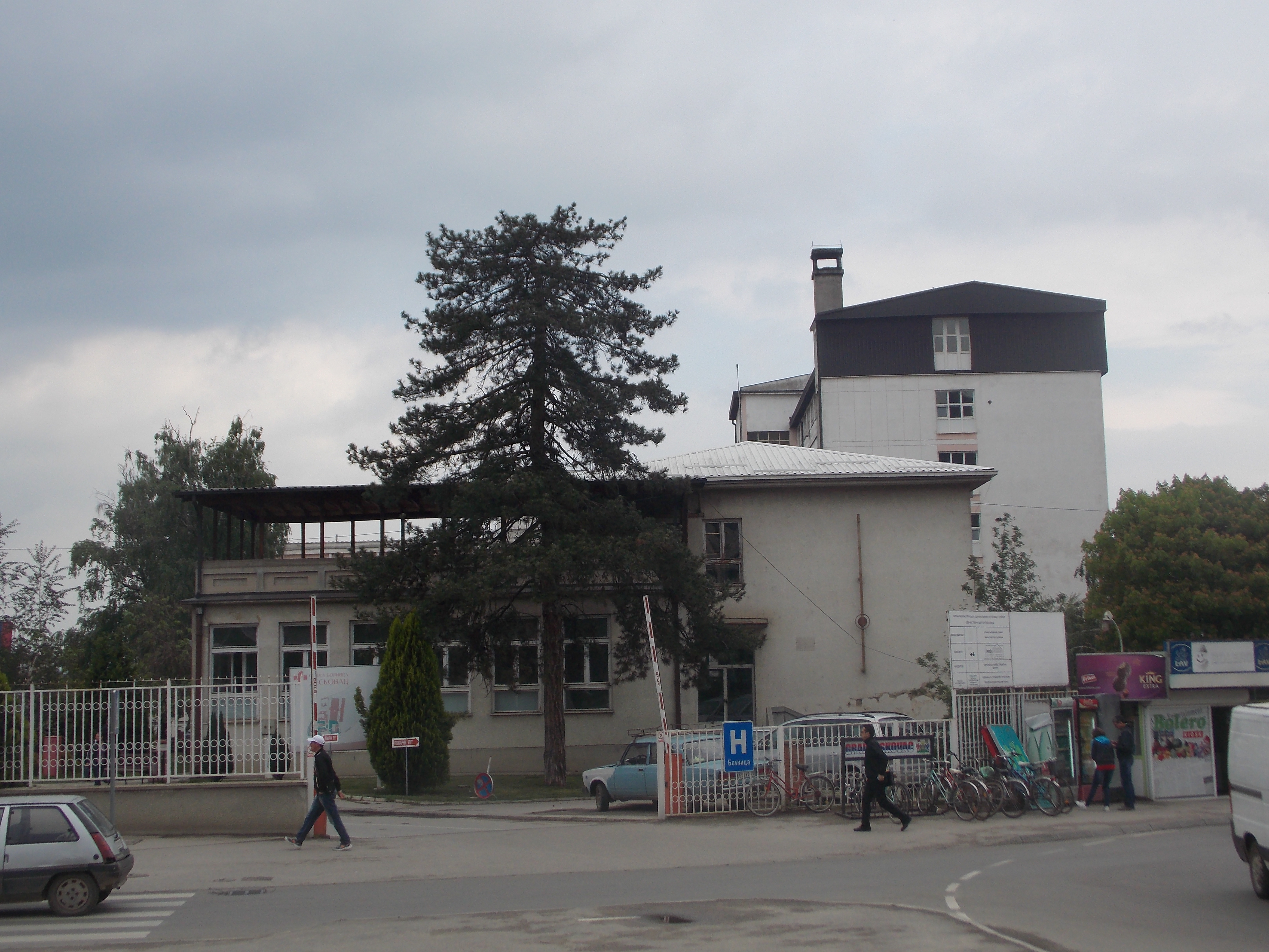 Opšta bolnica, Leskovac.